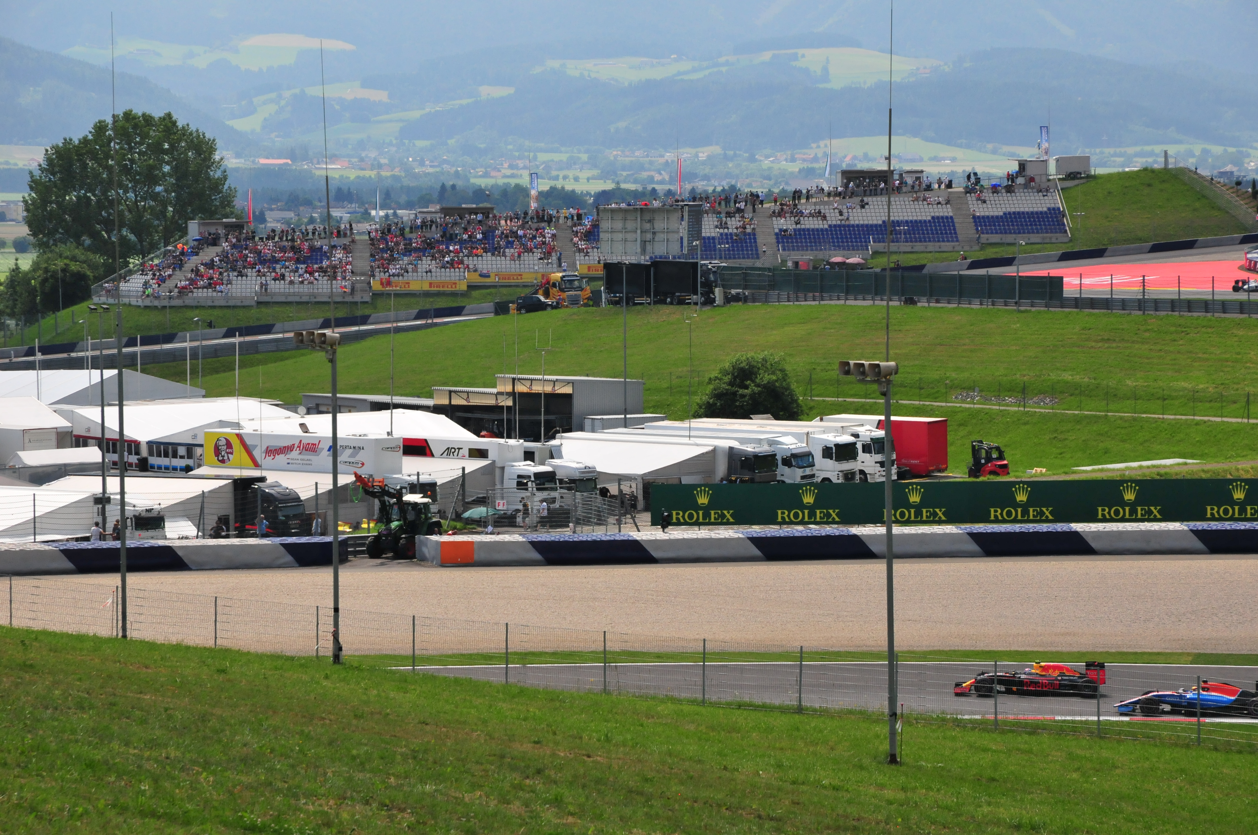 Formula One 2016 Austrian GP